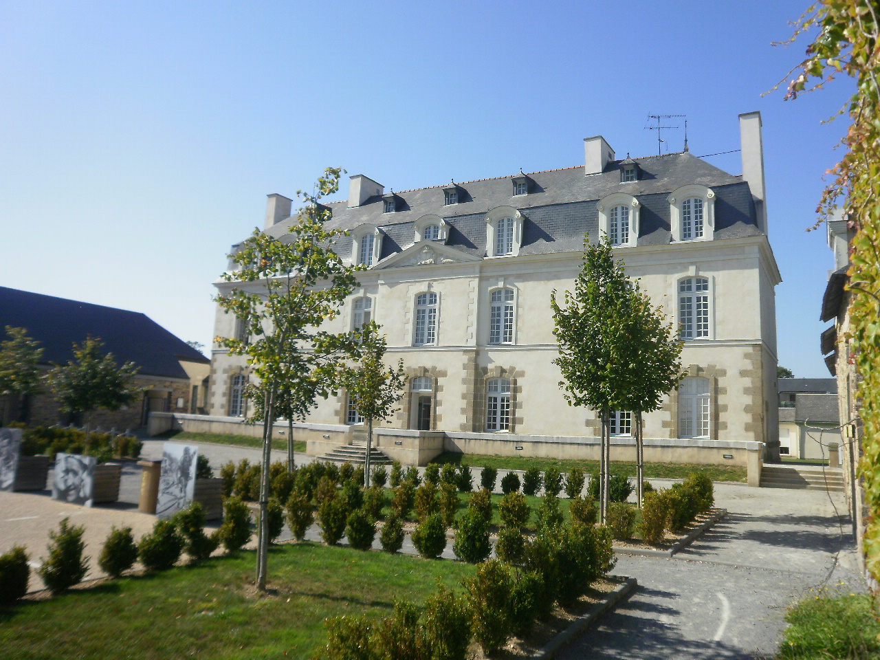 Chateau du parc-anger devenu médiathèque de la communauté de communes de pays de Redon